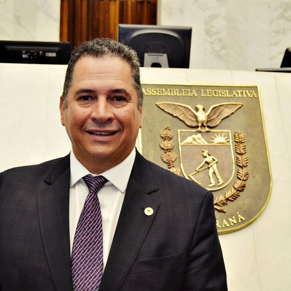 depgilsondesouza2019alep